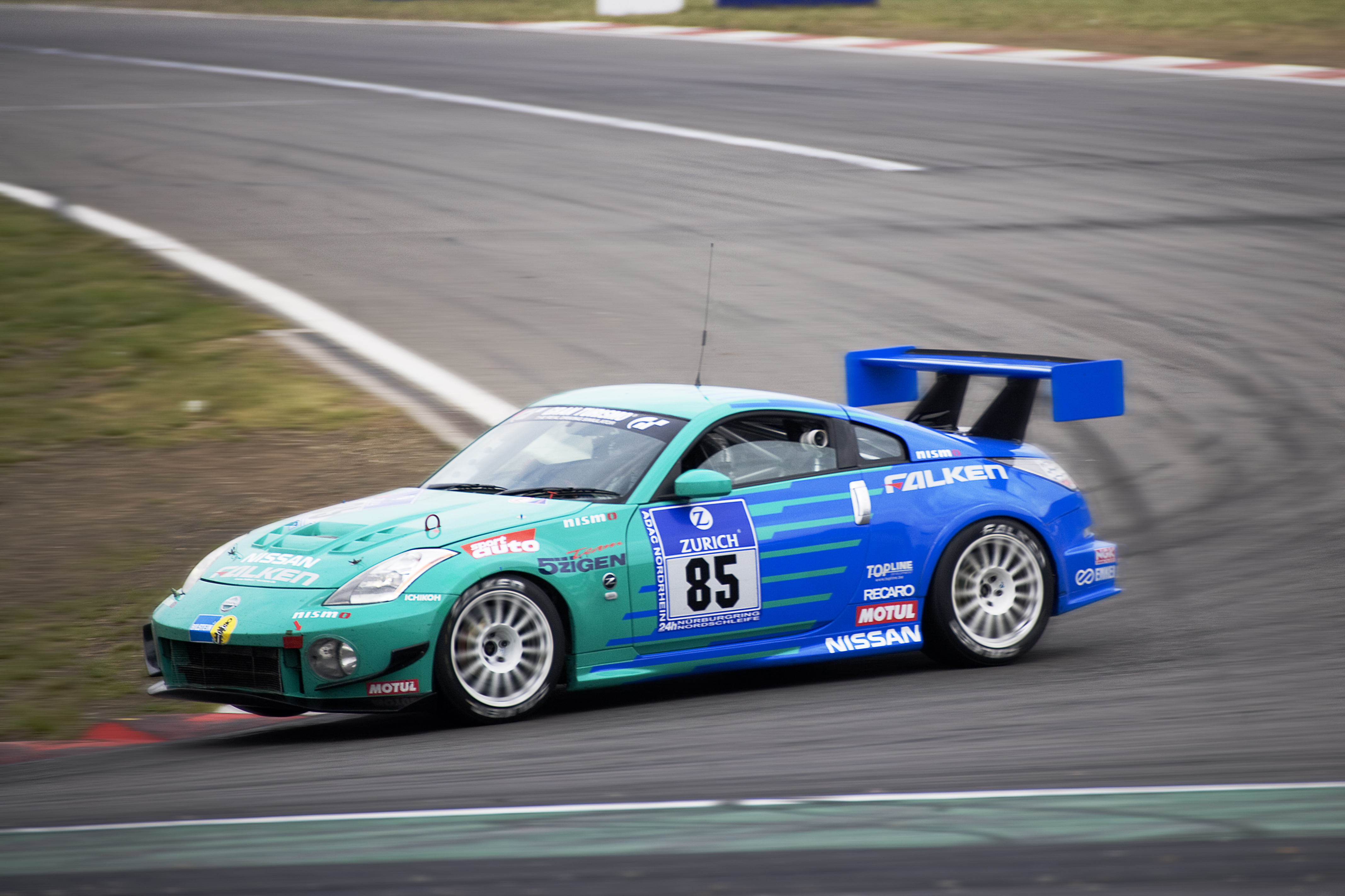 FALKEN Motorsports Nissan Z 33 Fairlady